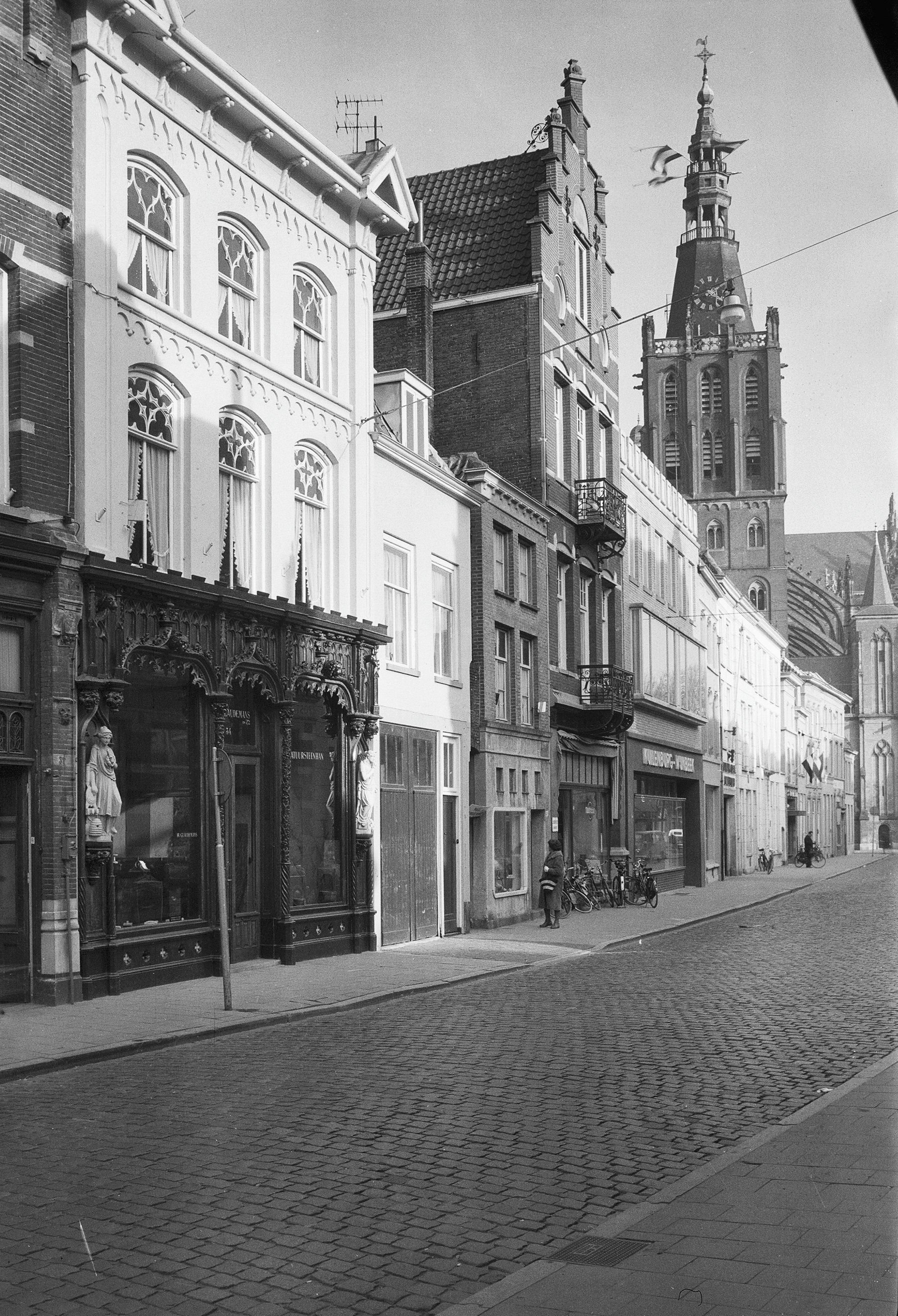 overzicht